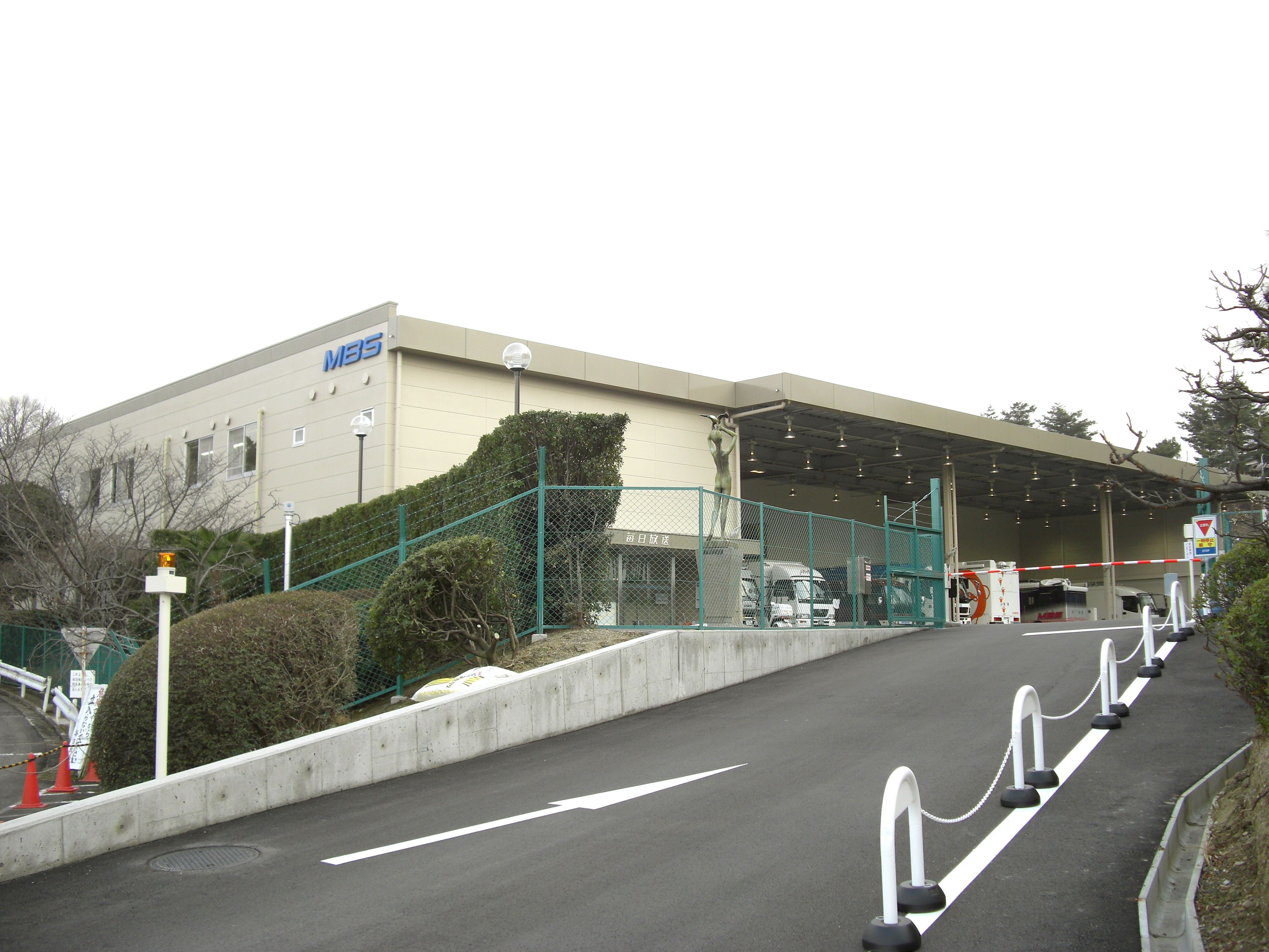 Senrioka Myrica Center,Senrioka-kita Suita-shi Osaka Japan.